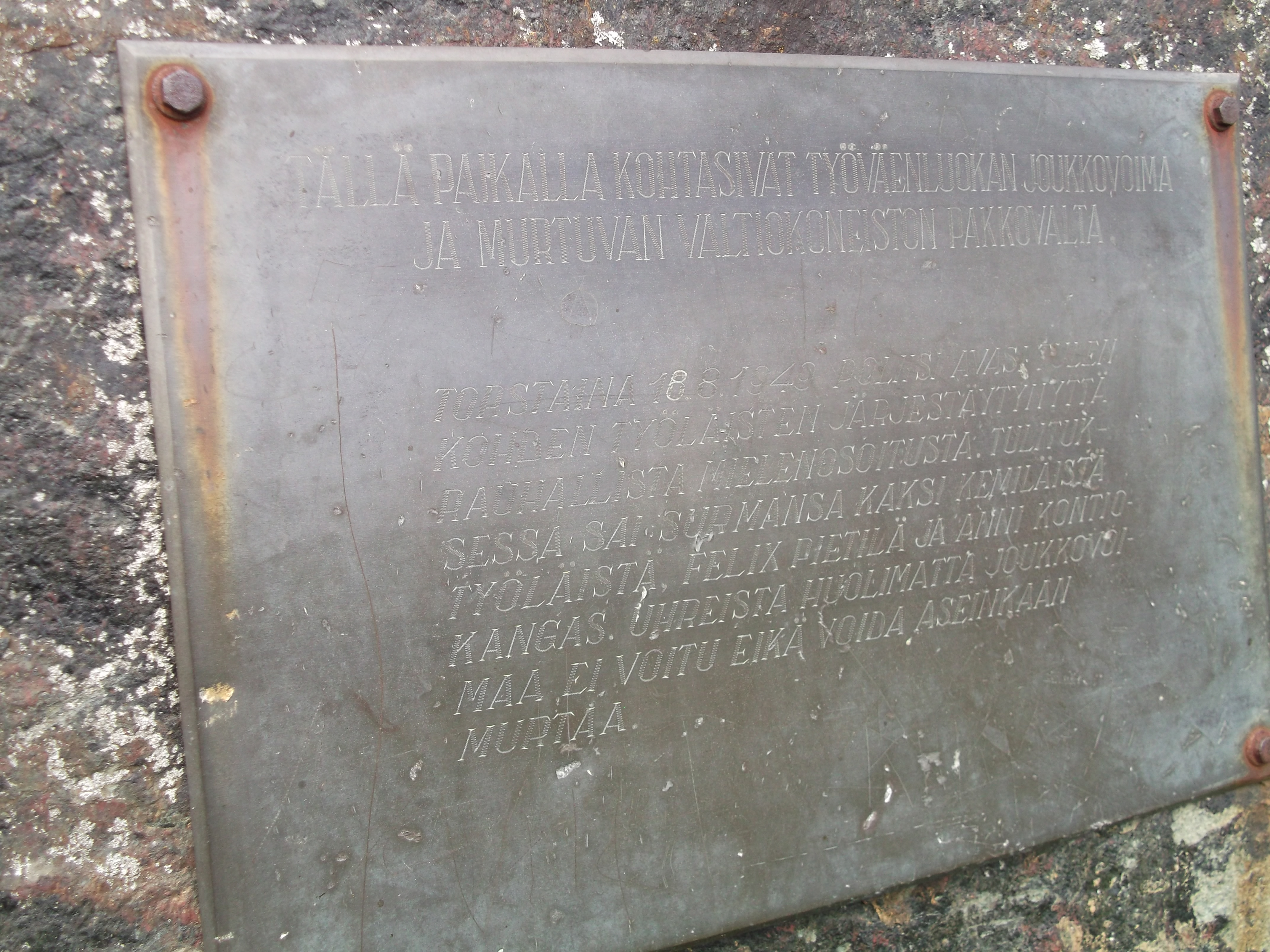 Kilven teksti: "Tällä paikalla kohtasivat työväenluokan joukkovoima ja murtuvan valtiokoneiston pakkovalta. Torstaina 18.8.1949 poliisi avasi tulen kohden työläisten järjestäytynyttä rauhallista mielenosoitusta. Tulituk- sessa sai surmansa kaksi kemiläistä työläistä, Felix Pietilä ja Anni Kontio- kangas. Uhreista huolimatta joukkovoi- maa ei voitu eikä voida aseinkaan murtaa." Kilvessä oleva päiväystä on jouduttu korjaamaan.